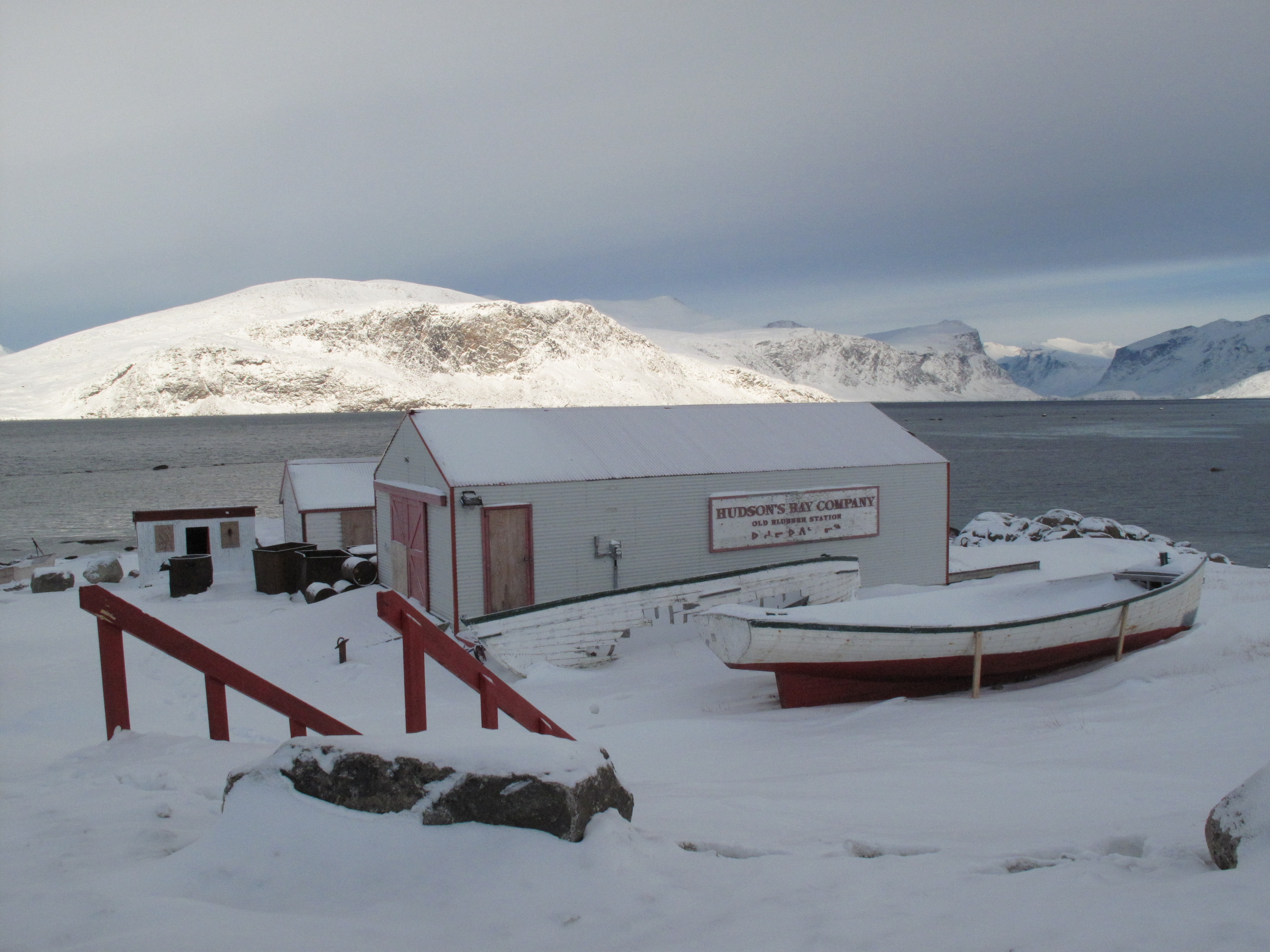 The Hudson's Bay Company in Nunavut Original caption: October 26-29, 2009: Nunavut visit Dominique Nadeau, U.S. Consulate General Quebec City, Peter Martin, U.S. :Consulate General Montreal, and Marja Verloop, U.S. Embassy Ottawa. 26-29 octobre : Visite du Nunavut Dominique Nadeau, Consulat général des É.U. à Québec, Peter Martin, Consulat :général des É.U. à Montréal, Marja Verloop, Ambassade des É.U. à Ottawa.